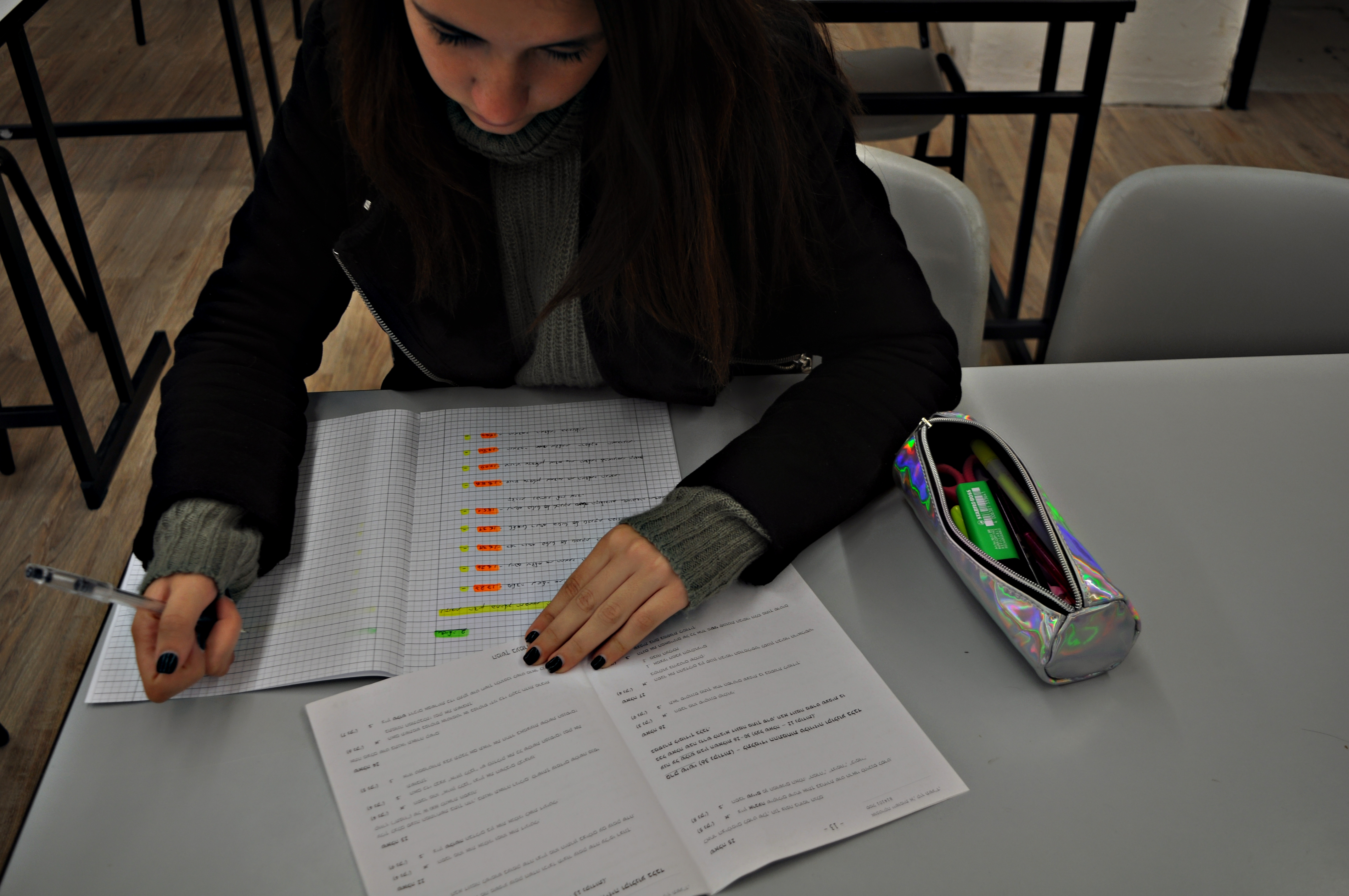 בחינת בגרות תיכון רוטברג